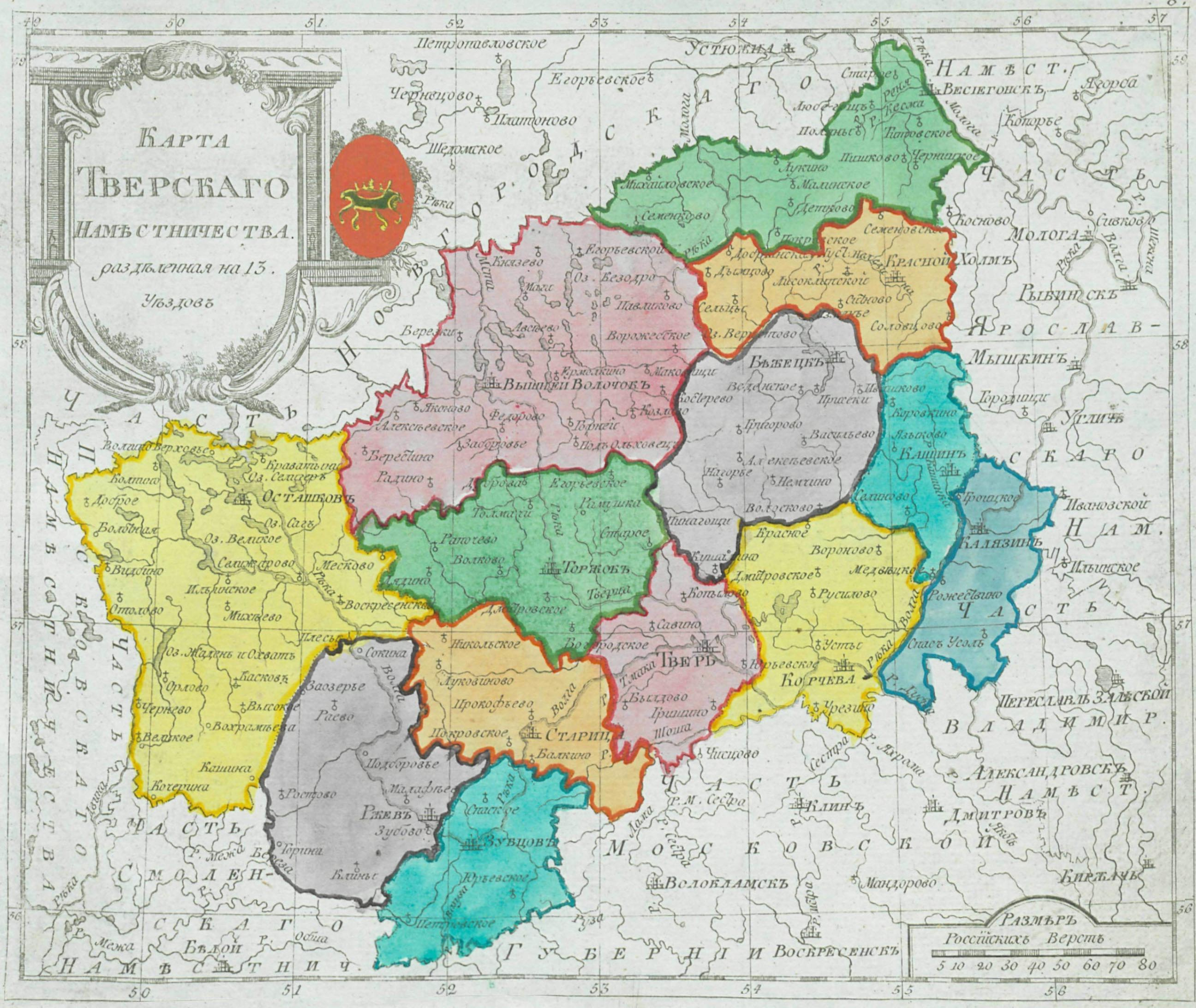 Карта Тверского наместничества (1792)